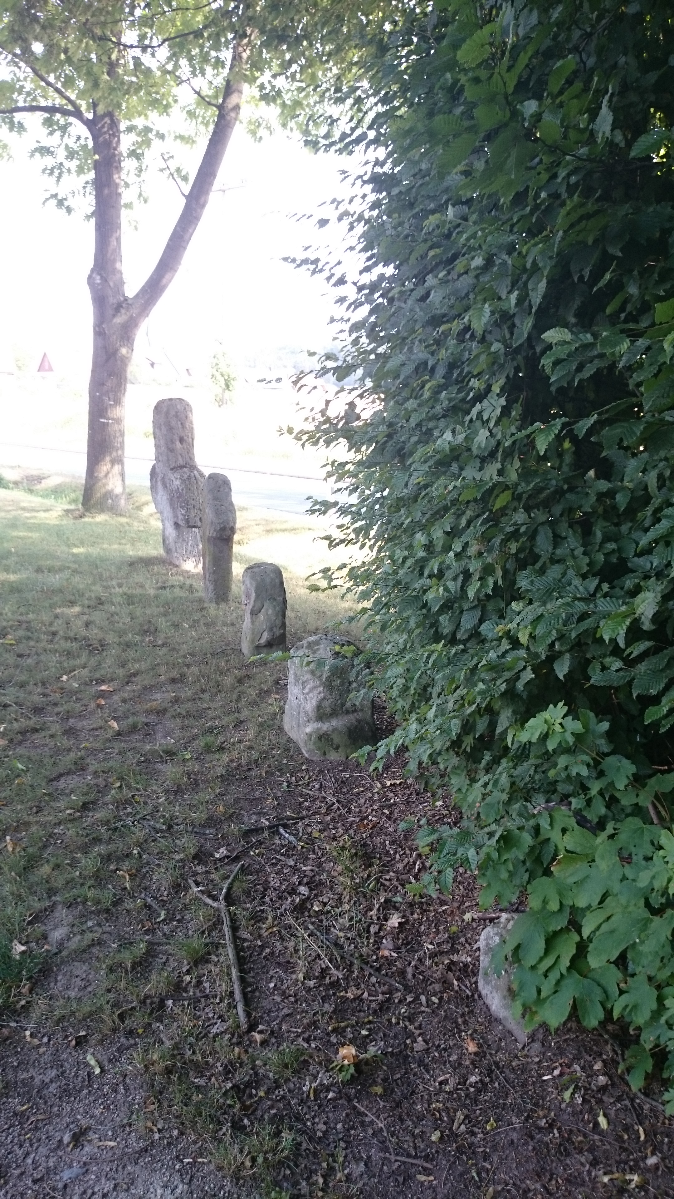 Sühnekreuznest Stübach (Diespeck)